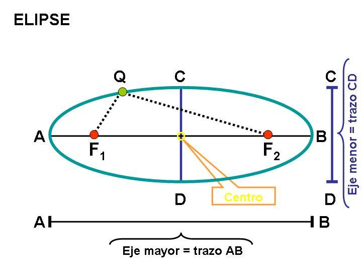 Longitud de onda